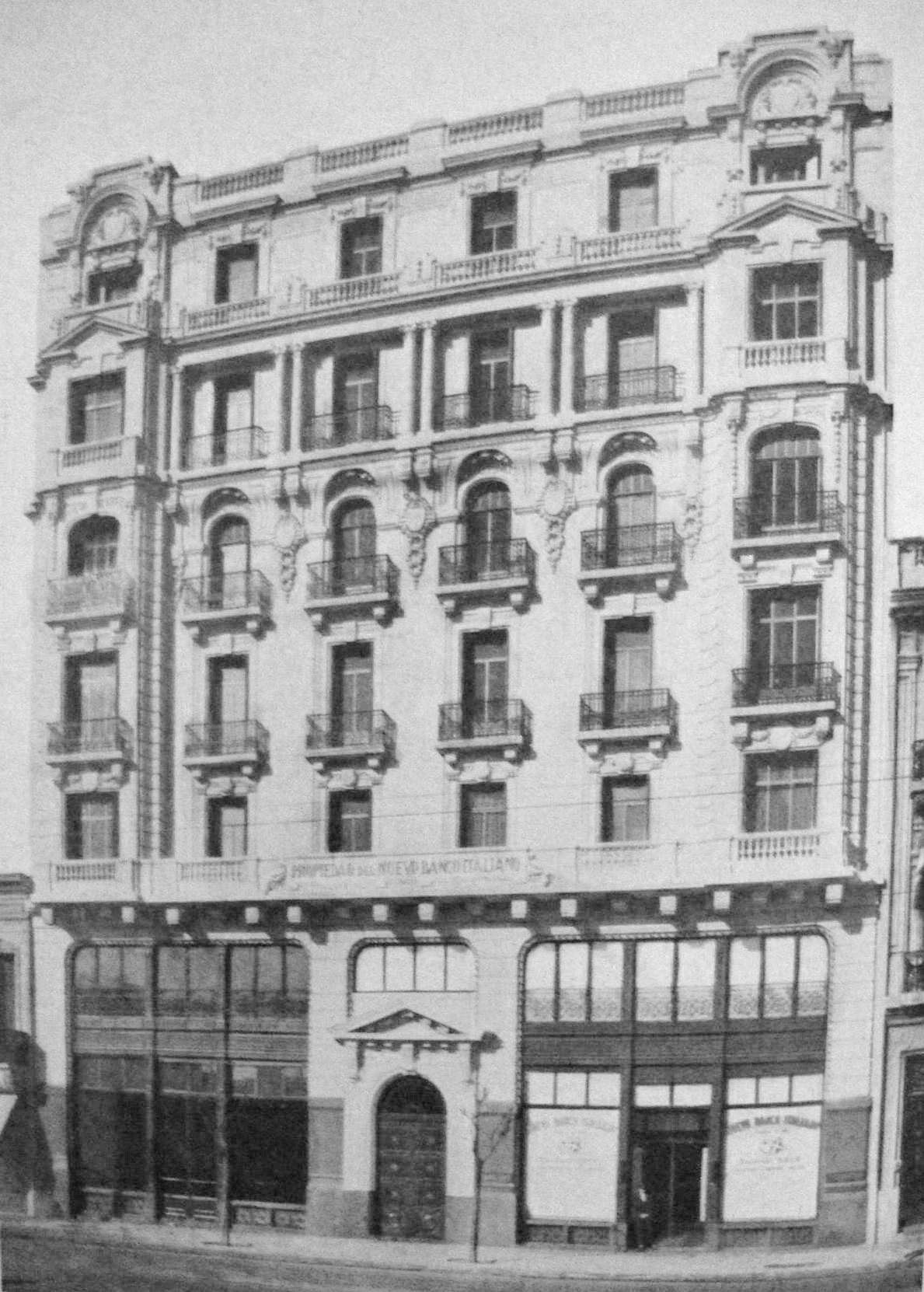 El Edificio Propiedad del Nuevo Banco Italiano, destinado a sucursal de dicha entidad financiera en la zona de Plaza de Miserere (Plaza Once) y a departamentos de renta, hoy propiedad horizontal. Se encuentra en Avenida Rivadavia 2768 - 2780.